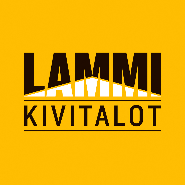 Lammi-Kivitalot logo